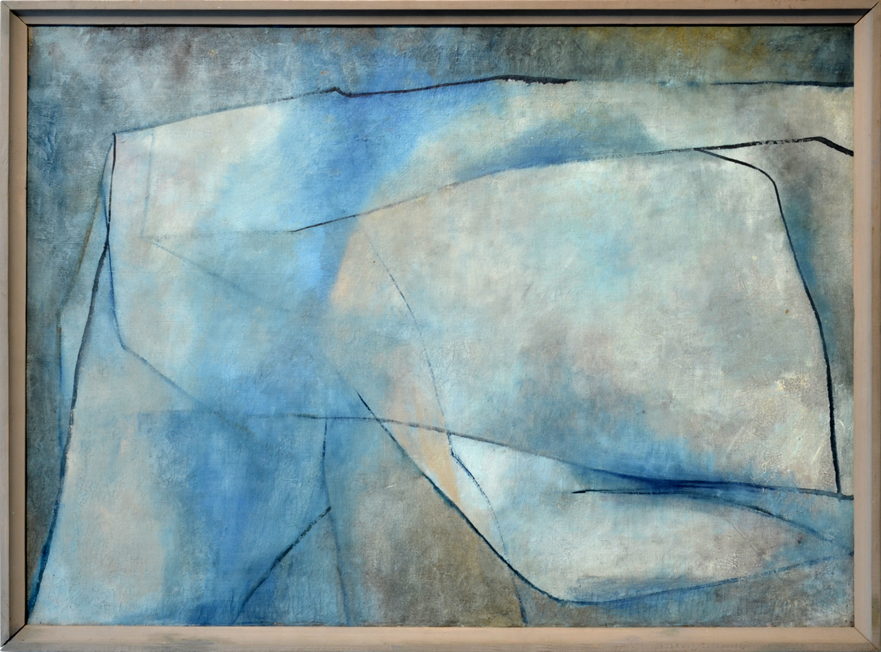 Jiří Mrázek, Krajina - žena, olej, plátno, 1962, GU Karlovy Vary